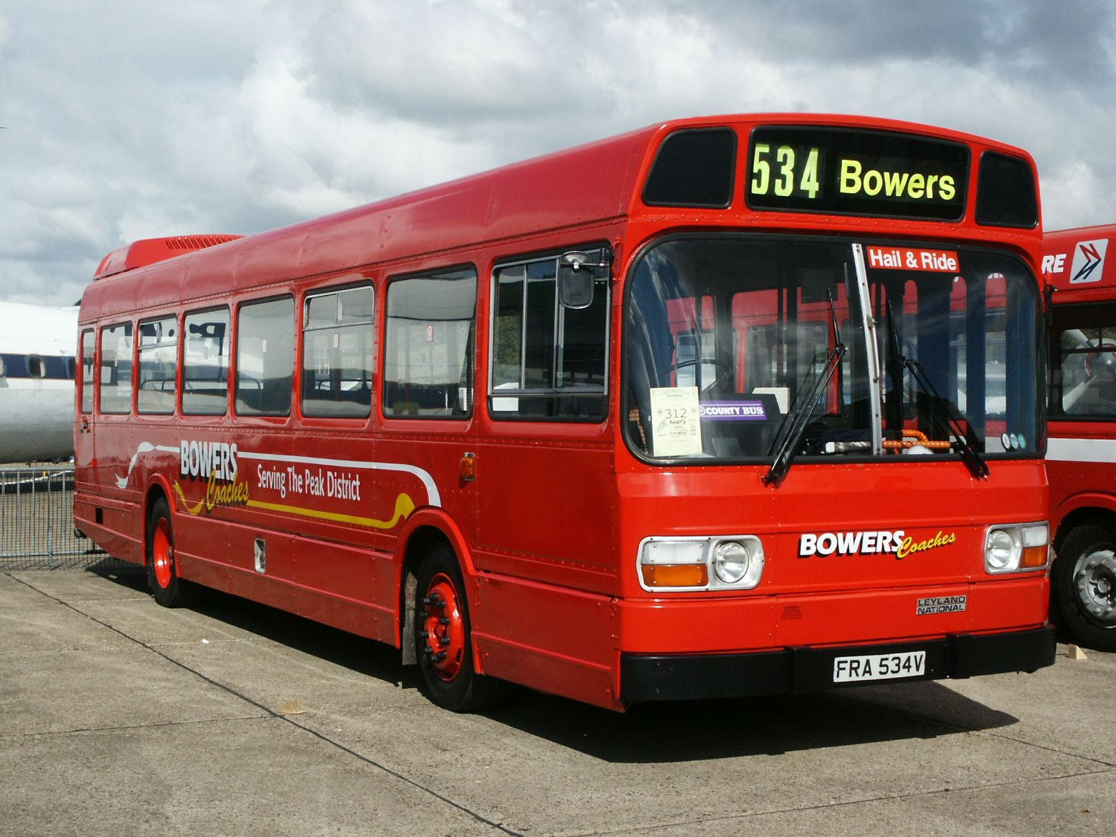 FRA534V BOWERS 220902 CPS